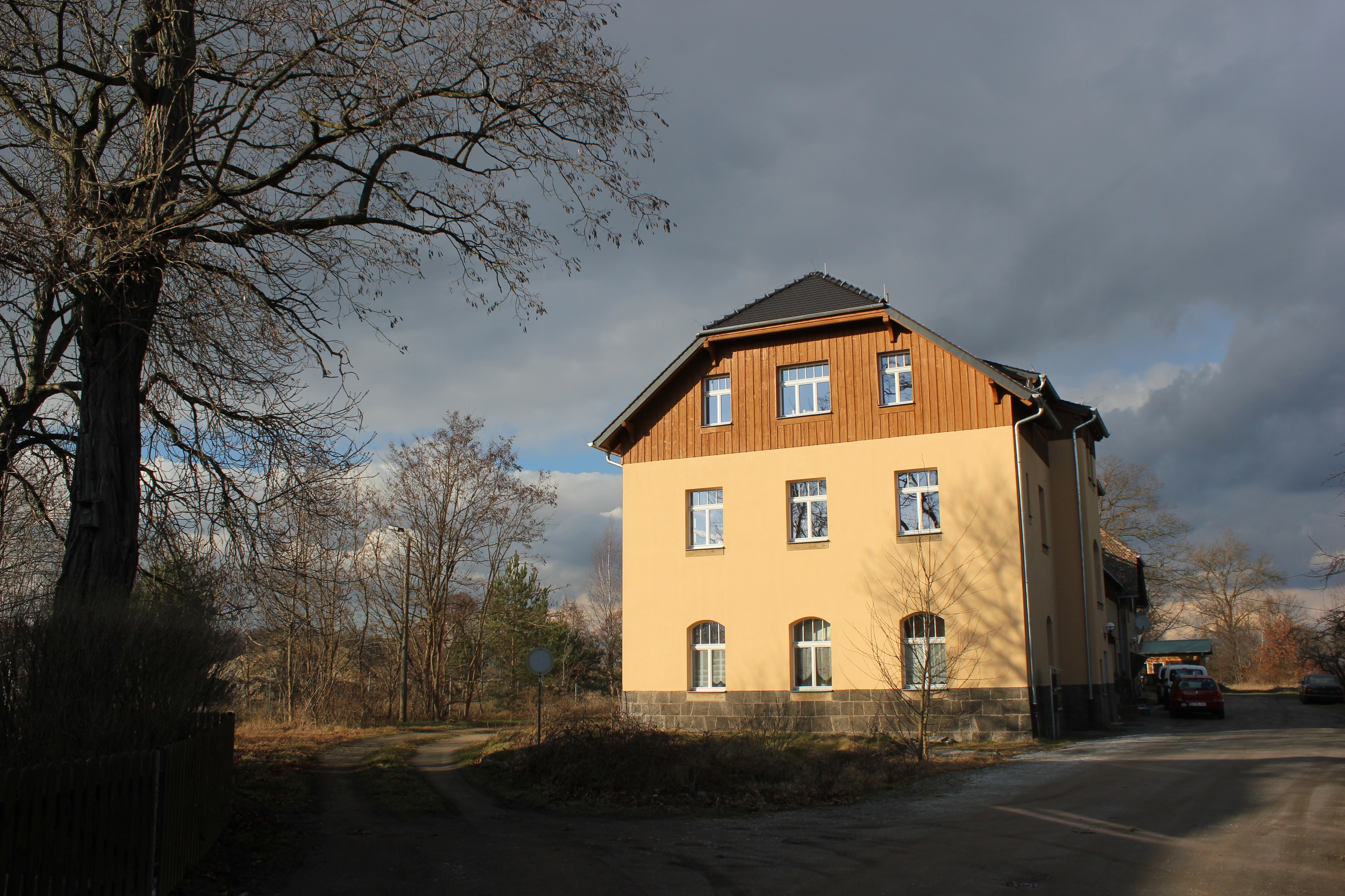 Hornjoserbsce: Něhdyše dwórnišćo pola Radworja.